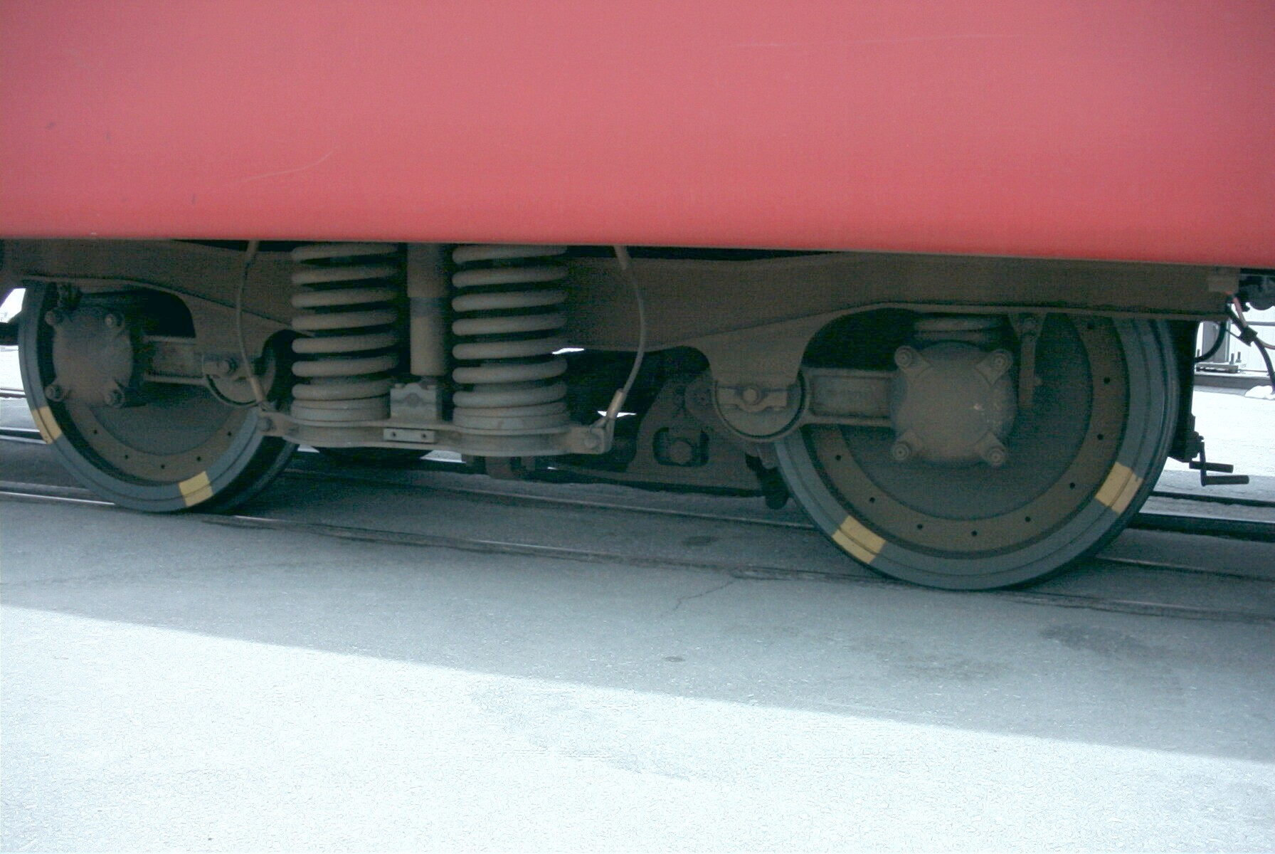 SWP-74-Drehgestell unter dem RhB B 2422 (FFA-Typ 2)